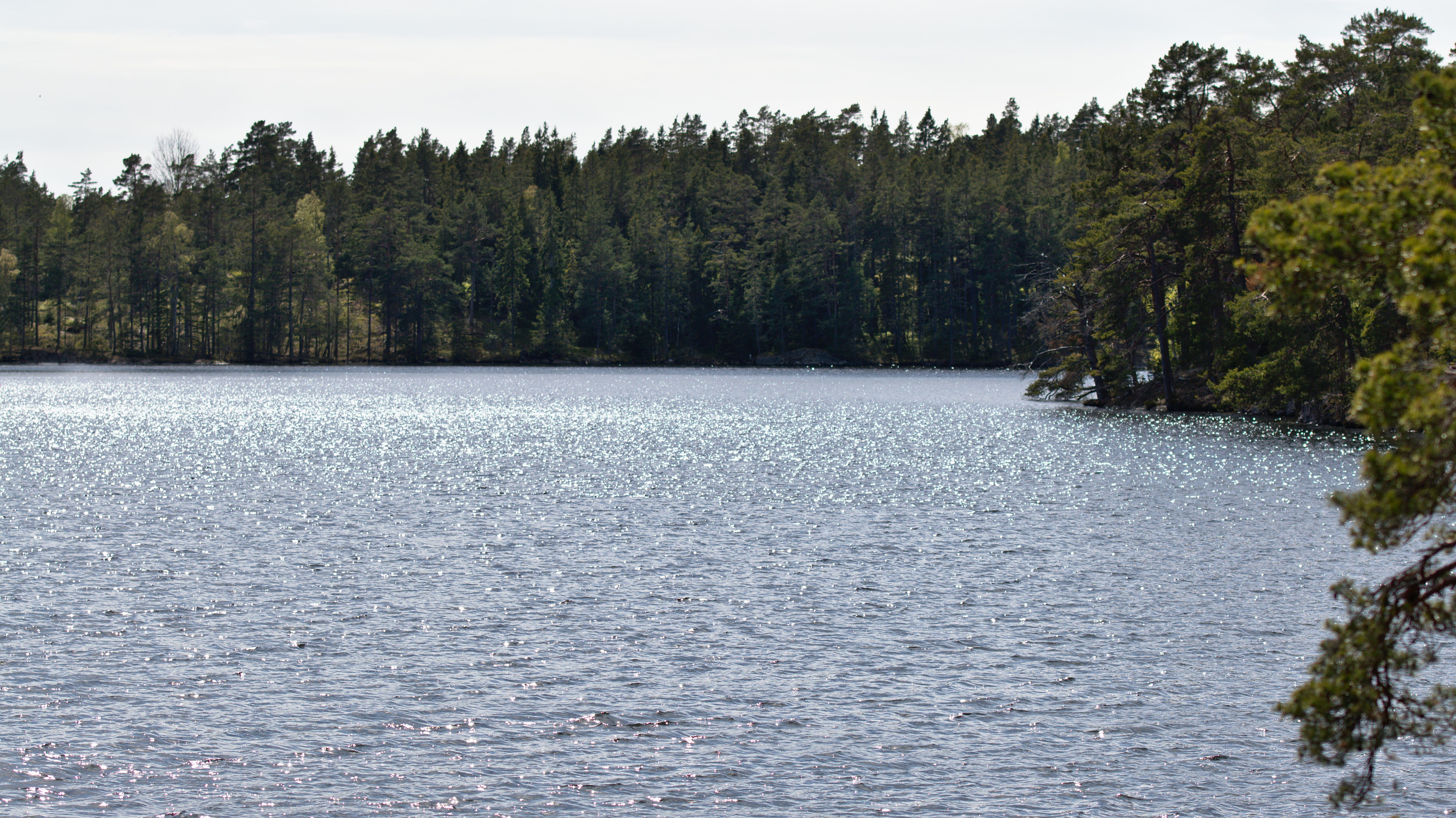 Sjön Stunnträsk på Ornö i Haninge kommun. Vy från norr.